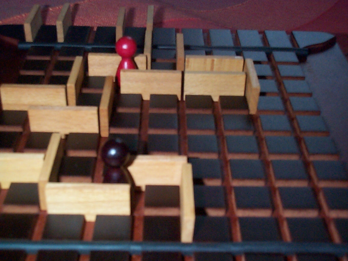 Labirintus a Quoridor nevű játékban